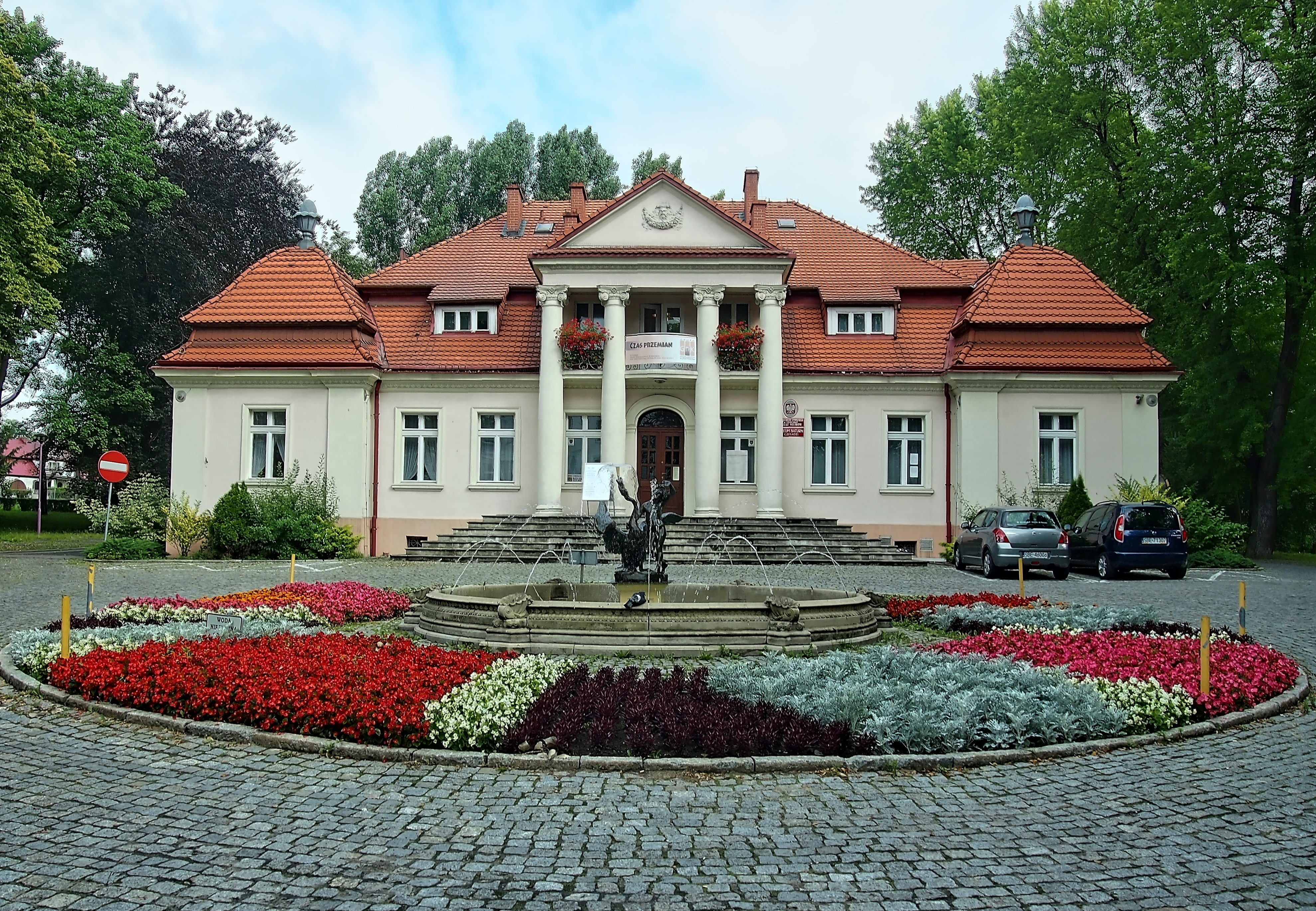 Muzeum Saturna w Czeladzi przy ulicy Dehnelów.